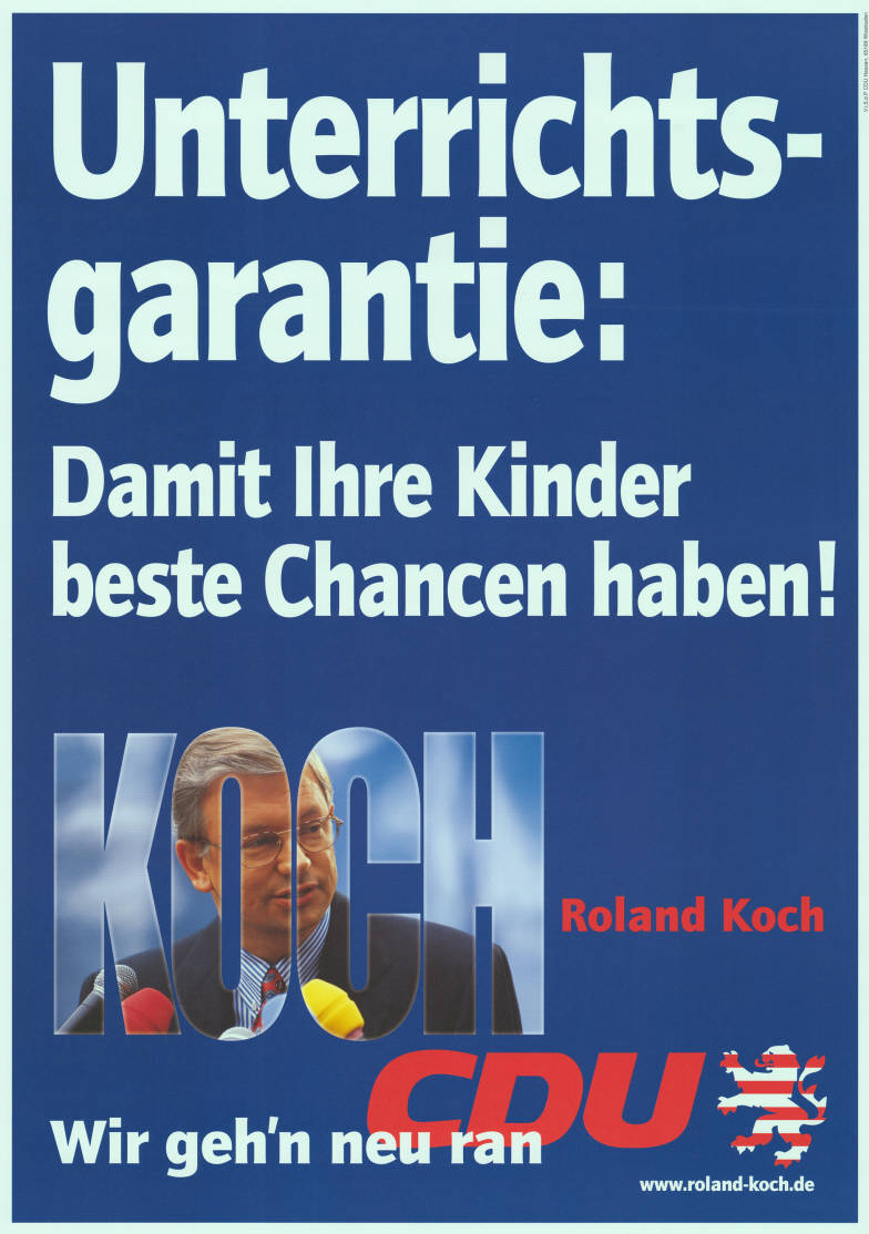 Unterrichtsgarantie: Damit Ihre Kinder beste Chancen haben! Koch Roland Koch Wir geh'n neu ran CDU Abbildung: Porträtfoto - Hessischer Löwe Plakatart: Kandidaten-/Personenplakat mit Porträt Auftraggeber: V.i.S.d.P.: CDU Hessen, Wiesbaden Objekt-Signatur: 10-007 : 1302 Bestand: Landtagswahlplakate Hessen (10-007) GliederungBestand10-18: Landtagswahlplakate Hessen (10-007) » CDU Lizenz: KAS/ACDP 10-007 : 1302 CC-BY-SA 3.0 DE